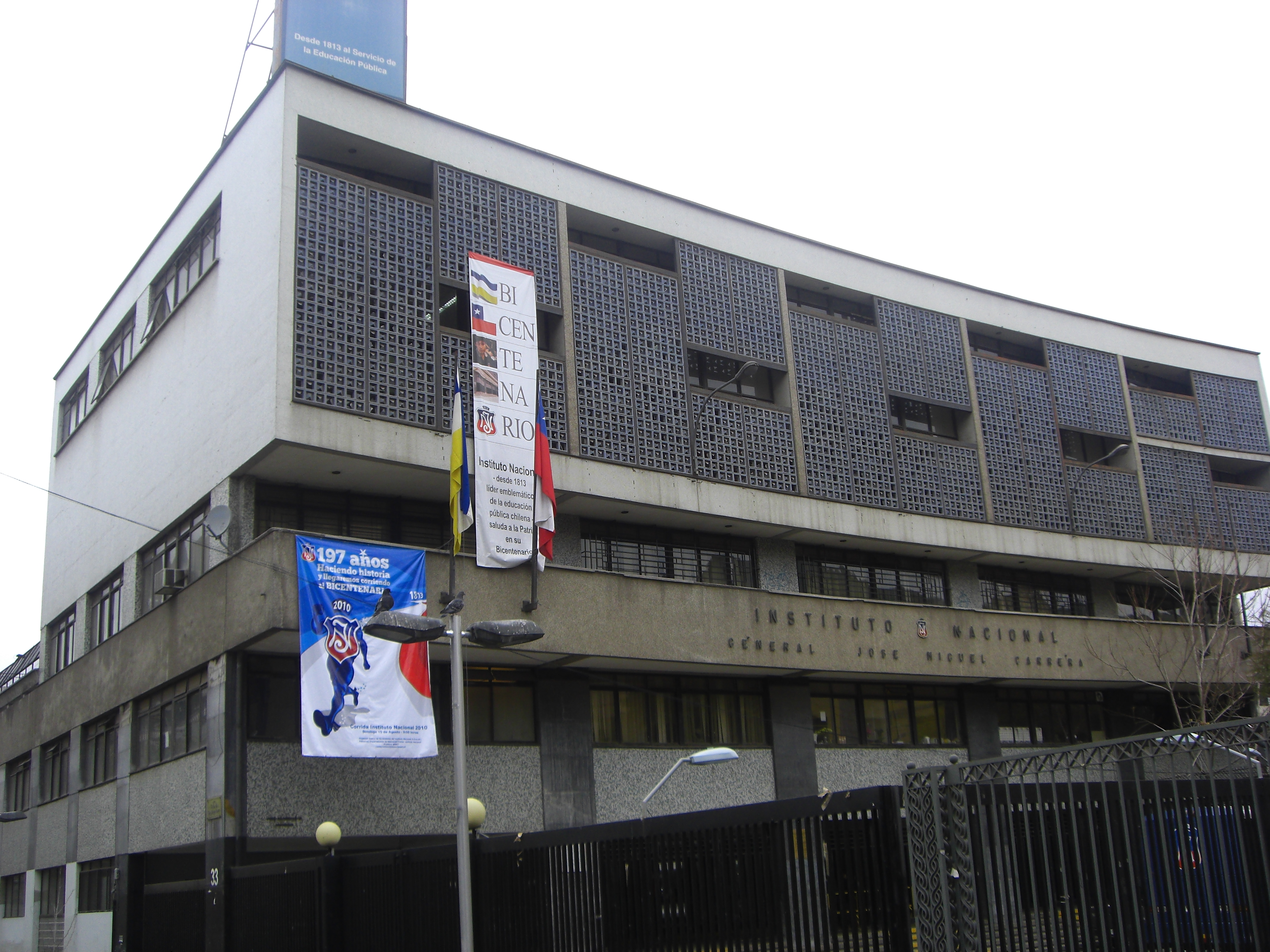 Fachada principal del edificio del Instituto Nacional, vista desde calle Arturo Prat.